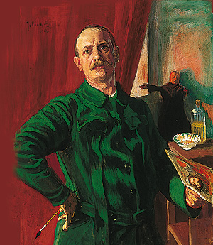 Selbstportrait